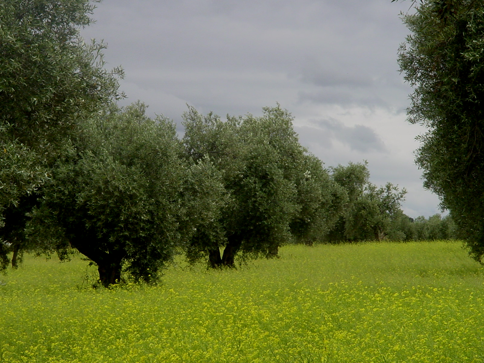 Olivar en las cercanías de Guarrazar, lugar en que se descubrió el tesoro visigótico del mismo nombre en 1858.